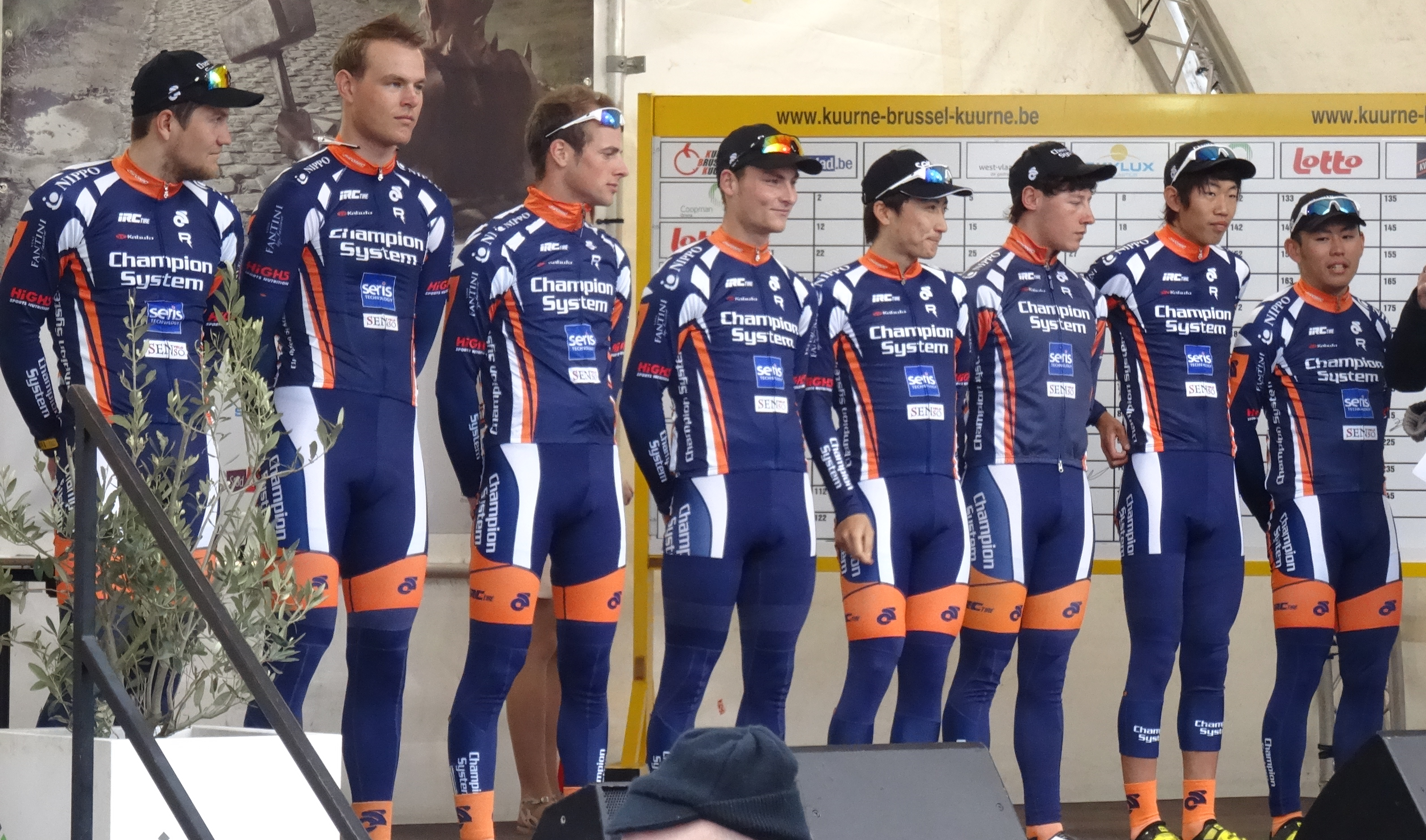 Reportage réalisé le dimanche 1er mars à l'occasion du départ et de l'arrivée de Kuurne-Bruxelles-Kuurne 2015 à Kuurne, Belgique.